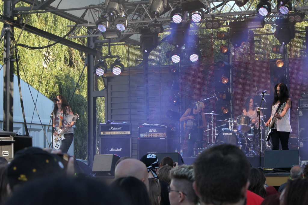 Stalingrad Cowgirls performing at Stockholm Pride